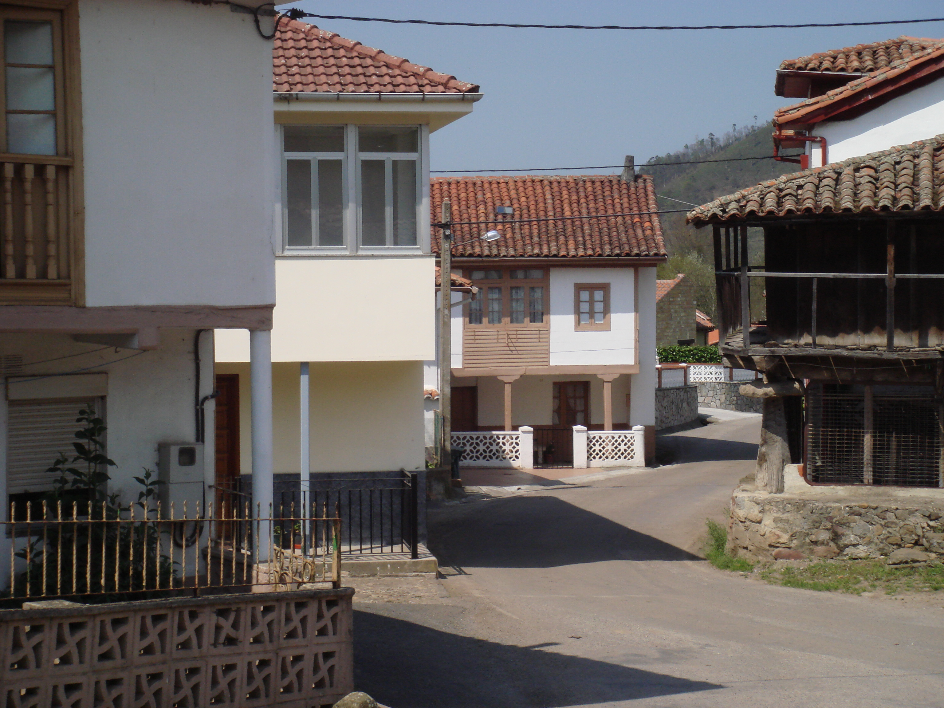 casas tipicas